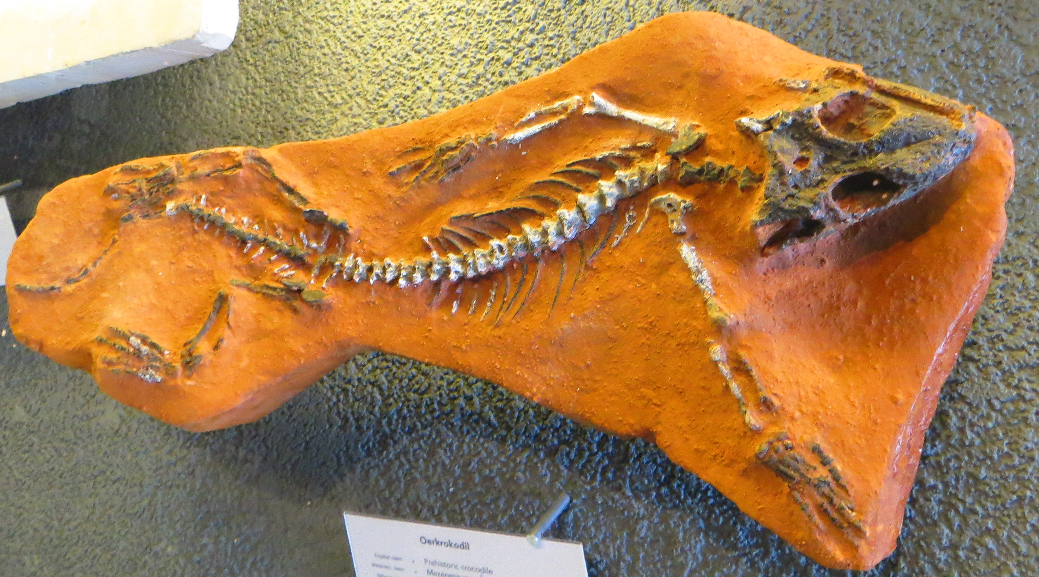 Fossil of Mesenosaurus, an extinct synapsid- Took the picture at Naturalis, Leiden